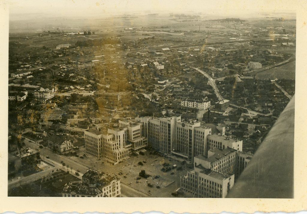 Беларуская (тарашкевіца): Менск (Miensk), погляд у бок Пляшчанкі (Plaščanka) ад сучаснага пляцу Незалежнасьці (plac Niezaležnaści). Аэрафотаздымак